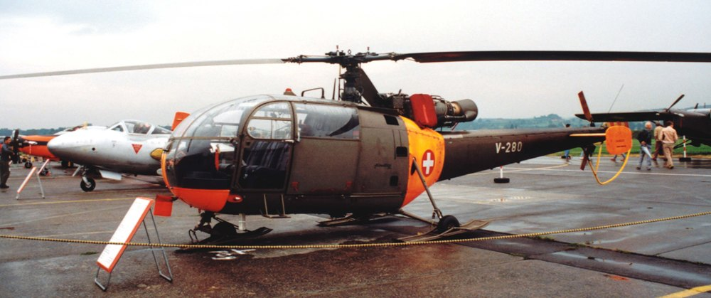 SUD Aviation Alouette III, aufgenommen in Dübendorf